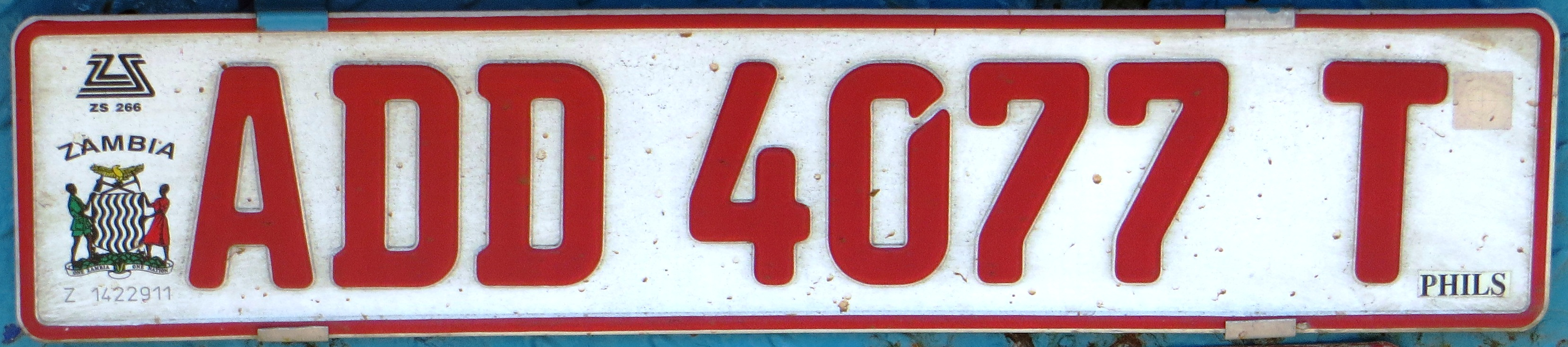 Zambia kentekenplaat